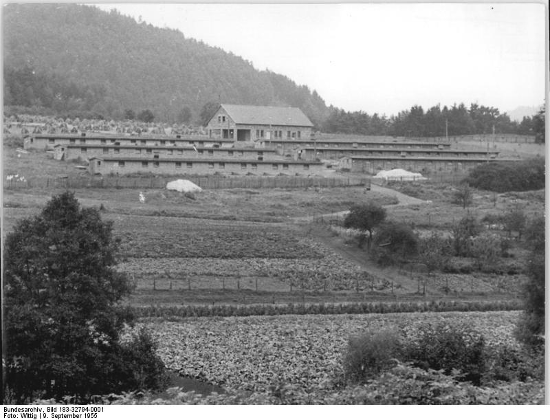 Zentralbild-TBD-Wittig Hlg-Ku. 4 Motive 9.9.1955 -3151- Volkseigenes Jugendgut "Thomas Münzer" in Amalienruh Kreis Meiningen schafft Voraussetzungen zur Steigerung der tierischen Funktion. Auf der Nebenstelle "Stillhof" des volkseigenen Jugendgutes "Thomas Münzer" in Amalienruh, Kreis Meiningen befindet sich eine moderne Schweineaufzuchtstation. Hier werden für den eigenen Bedarf des Jugendgutes und für die volkseigenen Güter der Umgebung Absatzferkel aufgezogen. Die Kollegen der Schweineaufzuchtstation "Stillhof" haben sich das Ziel gesetzt, bis Jahresende 145 Zuchtsauen zu ziehen, von denen ein Drittel Herbuchtiere werden sollen. UBz:, Übersicht über die Schweineaufzuchtstation.